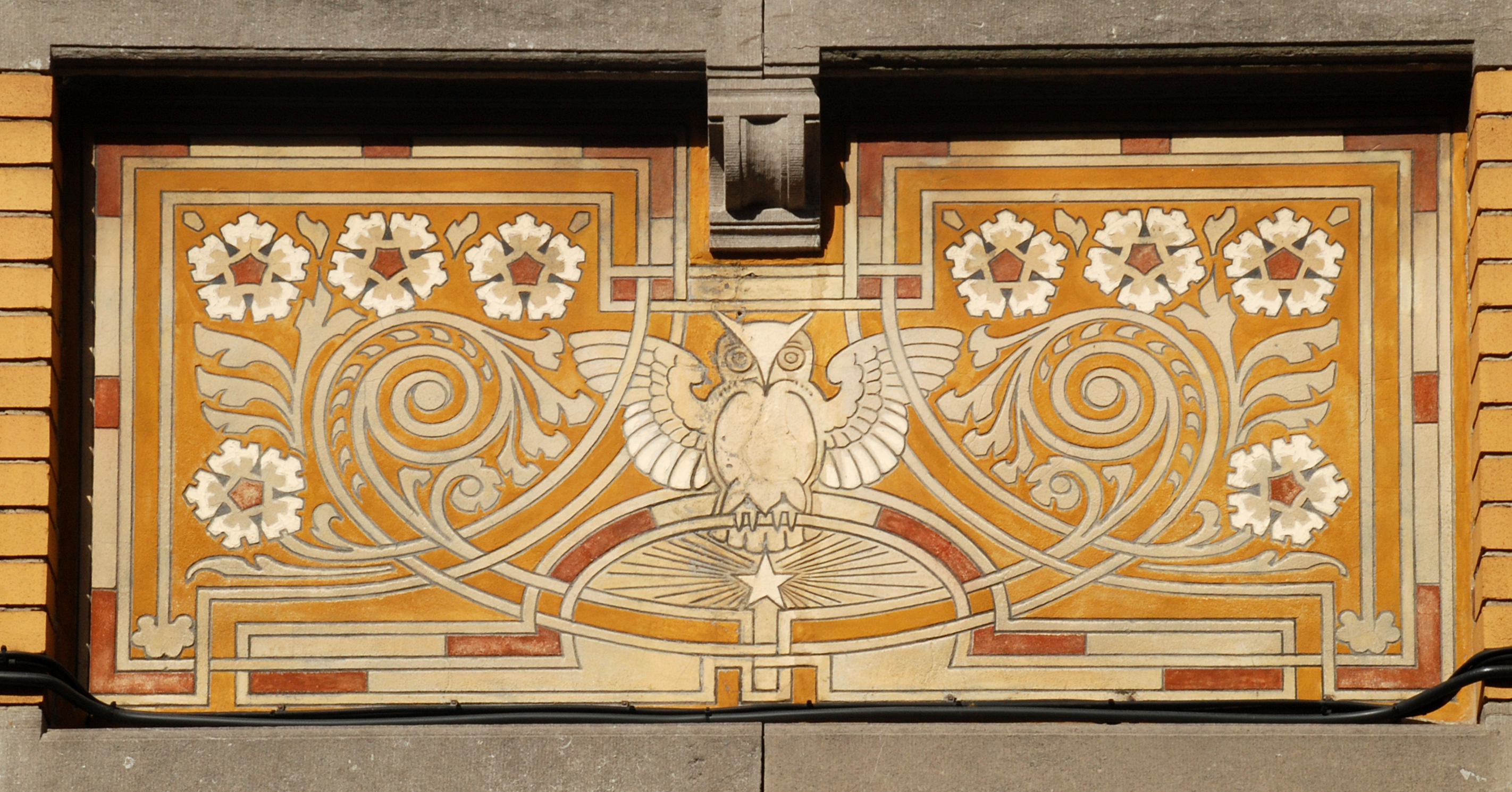 Belgique - Bruxelles - Ancienne école communale des filles de Koekelberg (Art nouveau - architecte Henri Jacobs) - Sgraffite au hibou